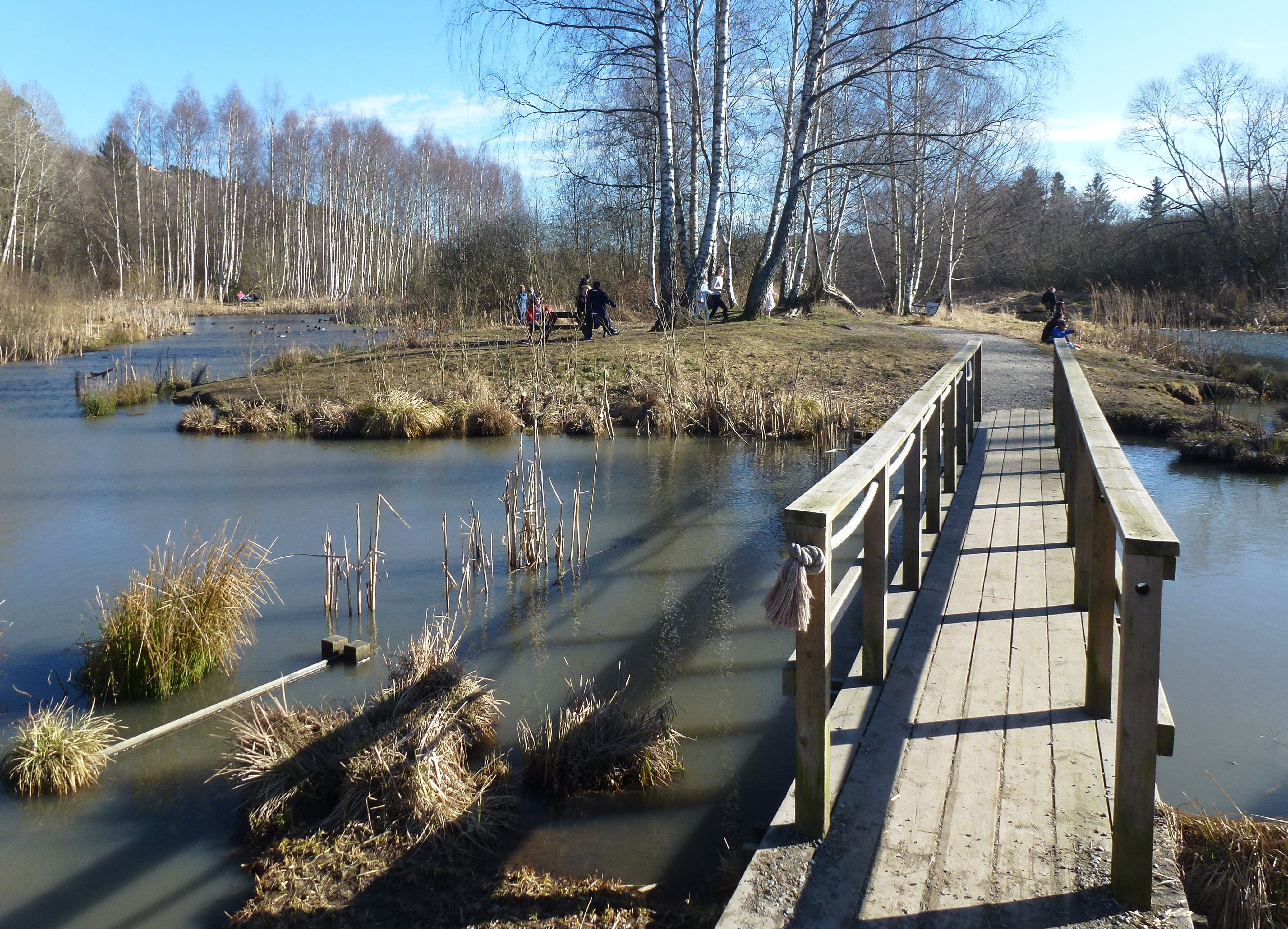 Kräpplaån / Kräppladiket